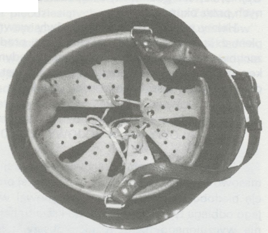 Hełm polski wz. 50 - wyposażenie wewnętrzne